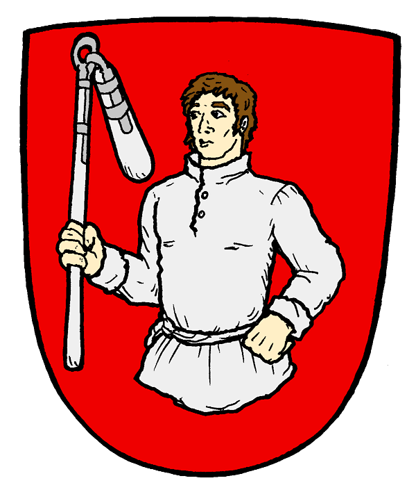 Urwappen derer von Cotzhausen (Kotzhusius)